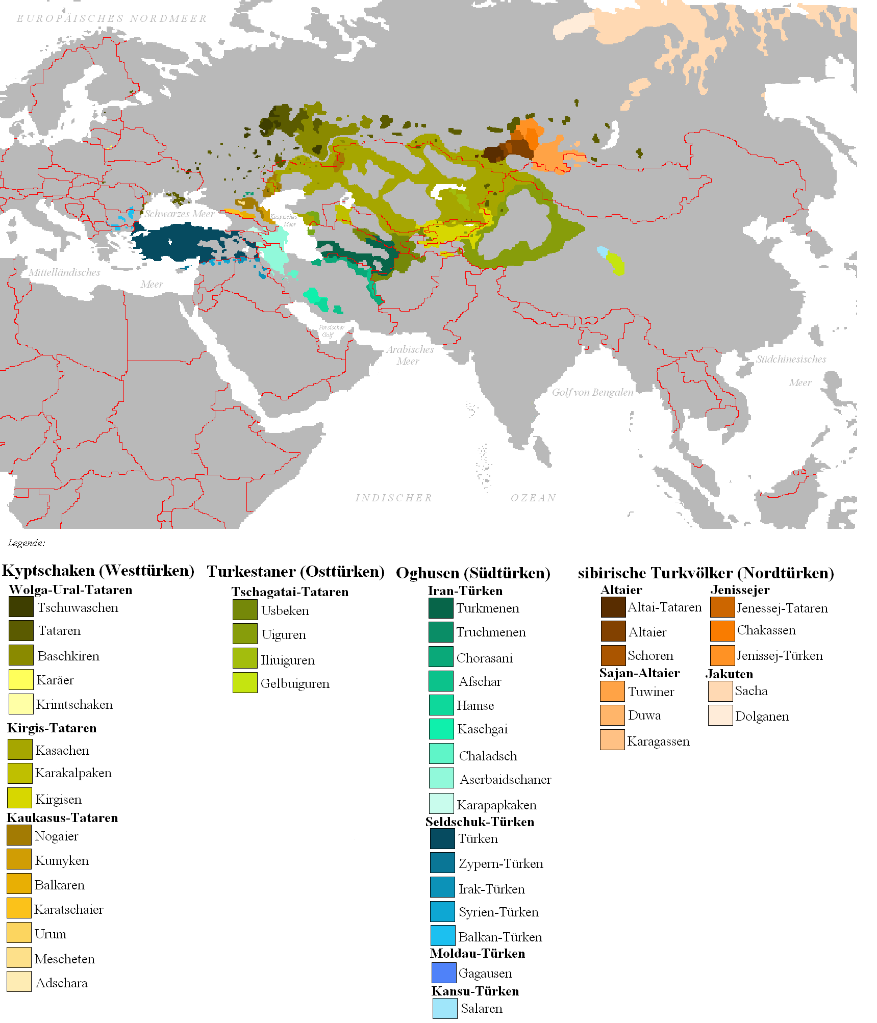 Verbreitungsgebiet der heutigen Turkvölker Beschreibung: Darstellungskarte mit den wichtigsten Vertretern der Turkvölker. Zu beachten ist hierbei jedoch, dass es sich bei den „georgischen Siedlungsgebiete“ der Mescheten um Historie handelt; die heutigen Hauptsiedlungsgebiete dieses Volkes liegt heute im Stavropoler Raum.